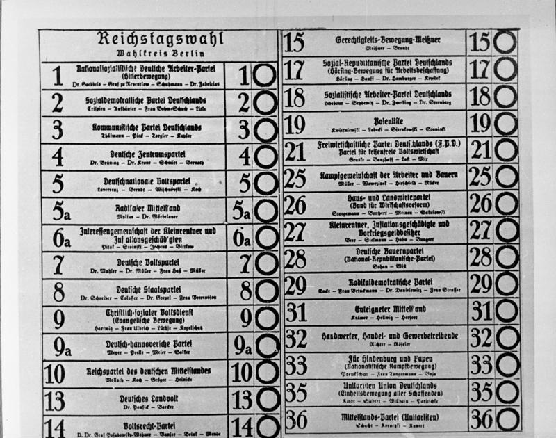 Wahlschein, 29 Parteien, Berlin